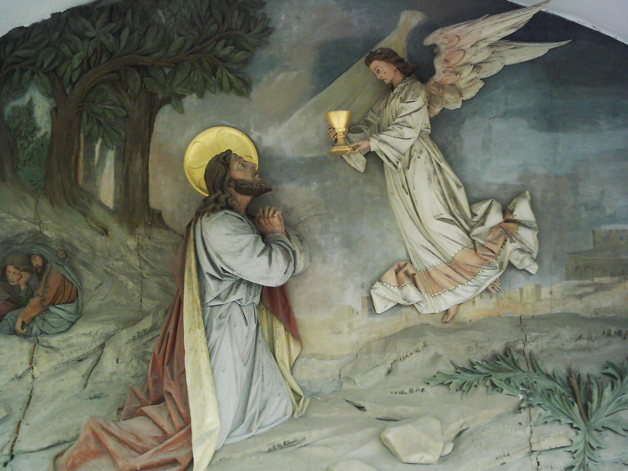 Ölbergszene, Relief, St. Konrad in Berkheim